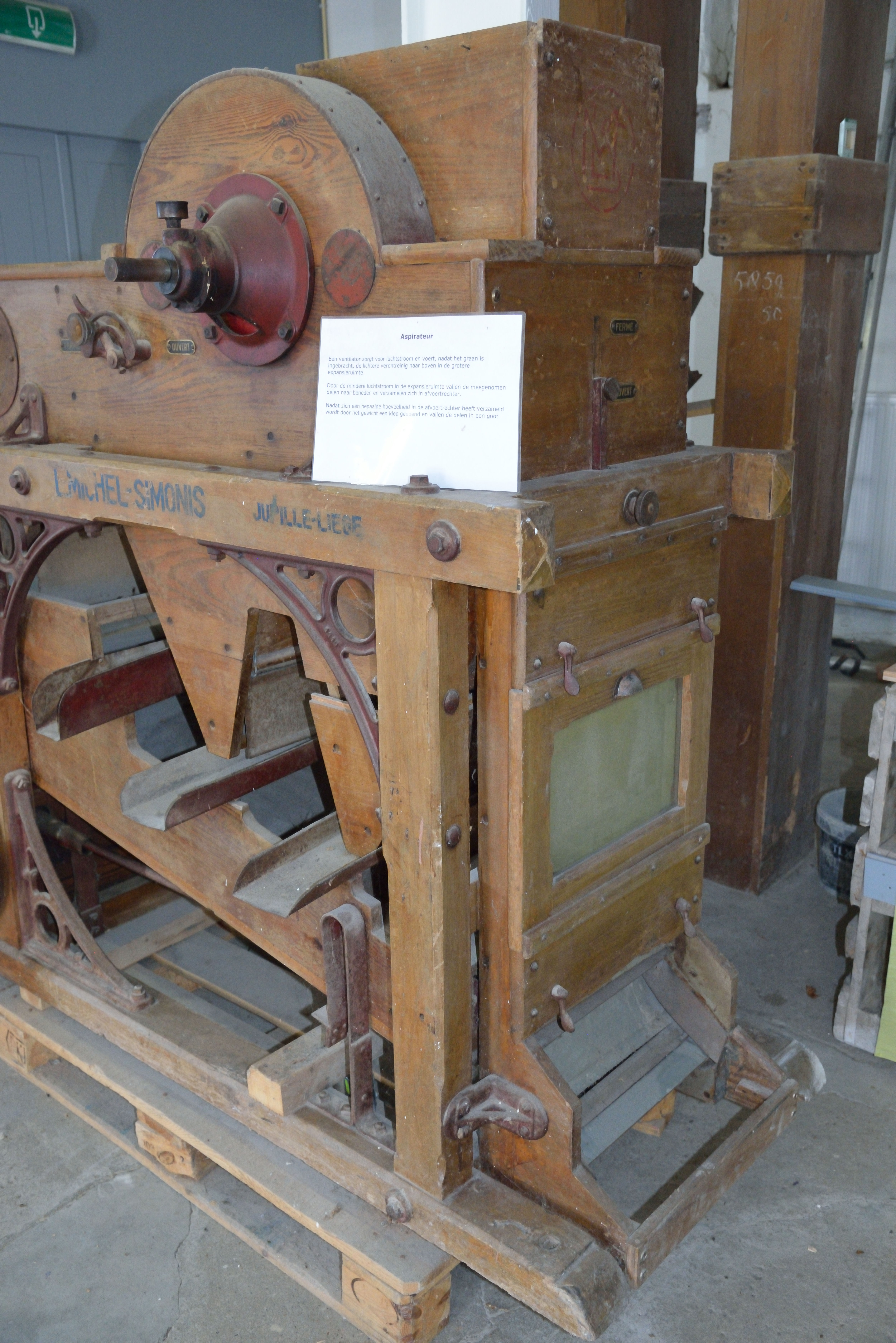 Oude of Banmolen, Valkenburg, aspirateur. Een luchtstroom voert de verontreinigingen naar een expansieruimte.